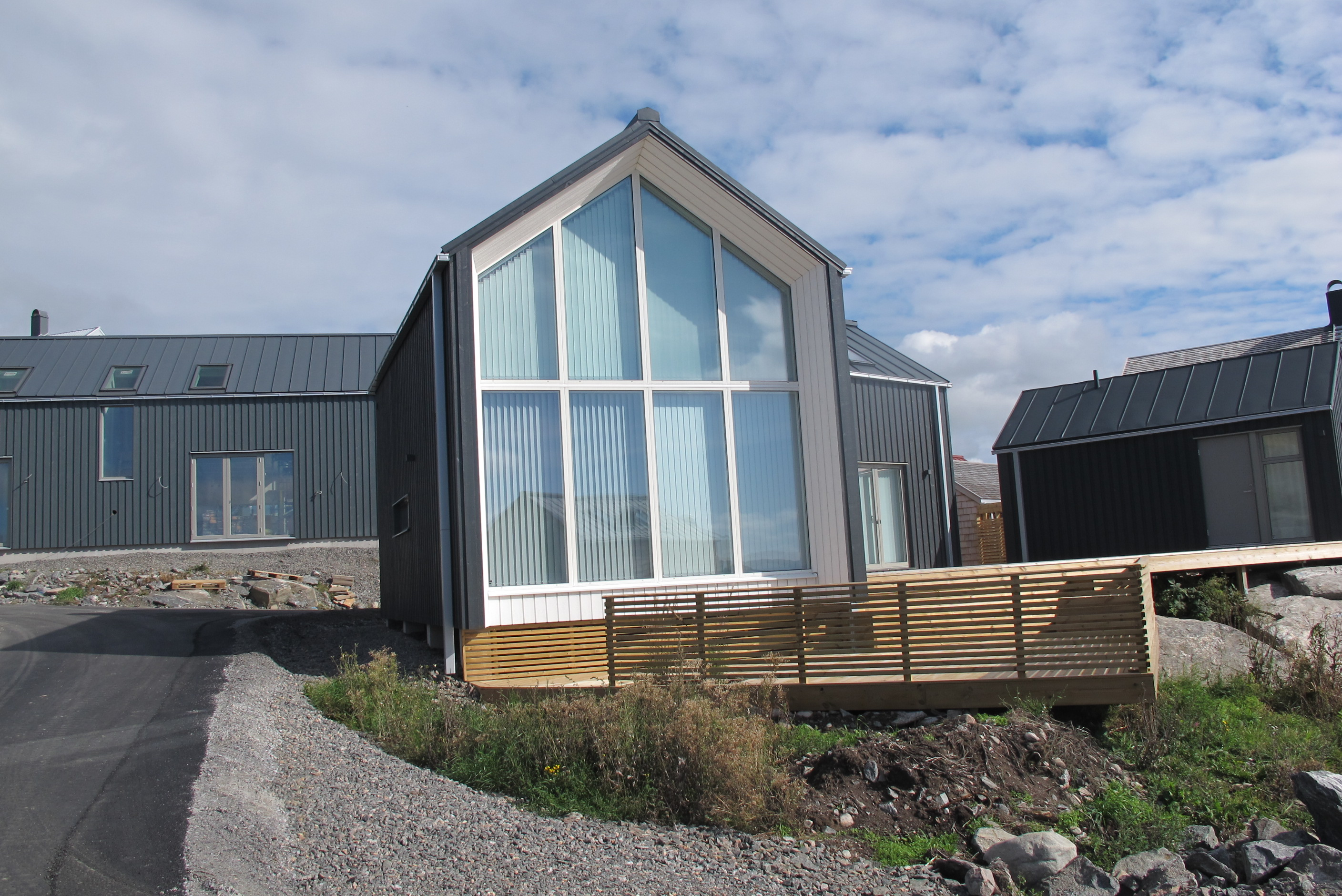 Nybyggt hus på Lilla Fjellsholmen, tidigare Trälen.